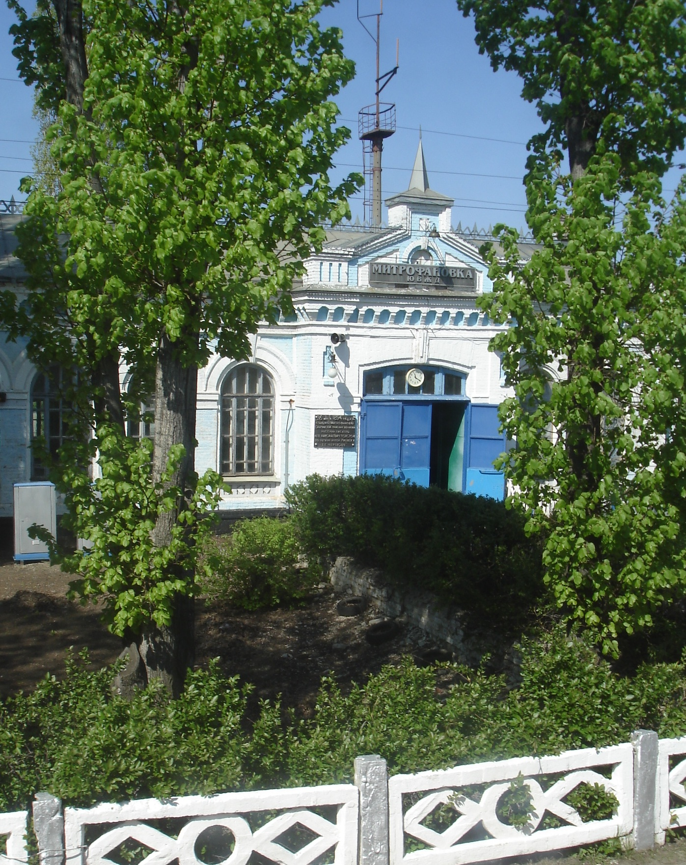 Железнодорожная станция Митрофановка, мемориальная доска Льву Толстому